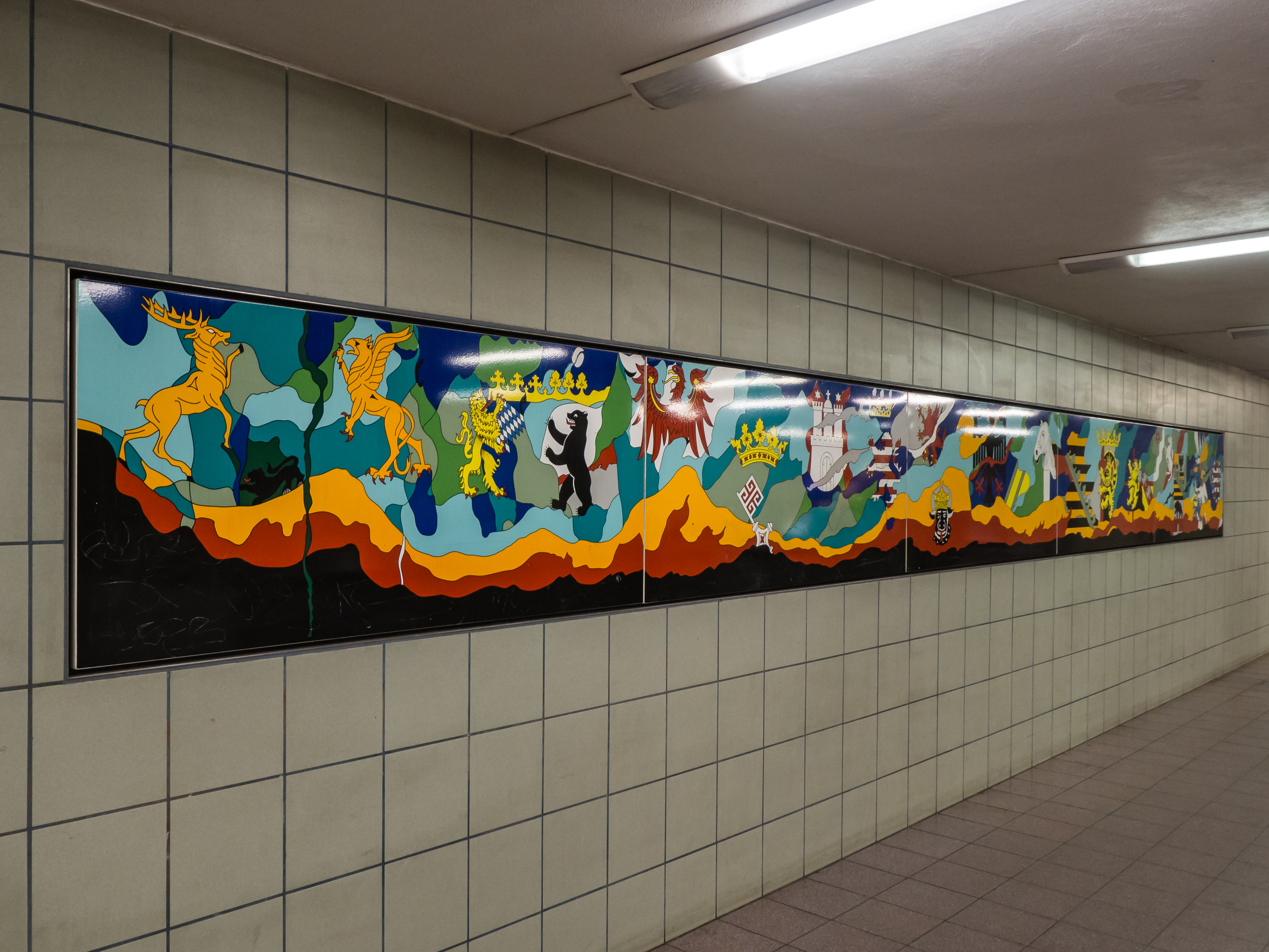 Eingang zum U- und S-Bahnhof Bundesplatz